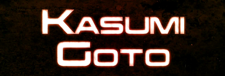 Logotyp till Mass Effect 2: Kasumi - Stolen Memory, ett expansionspaket till actionrollspelet Mass Effect 2.